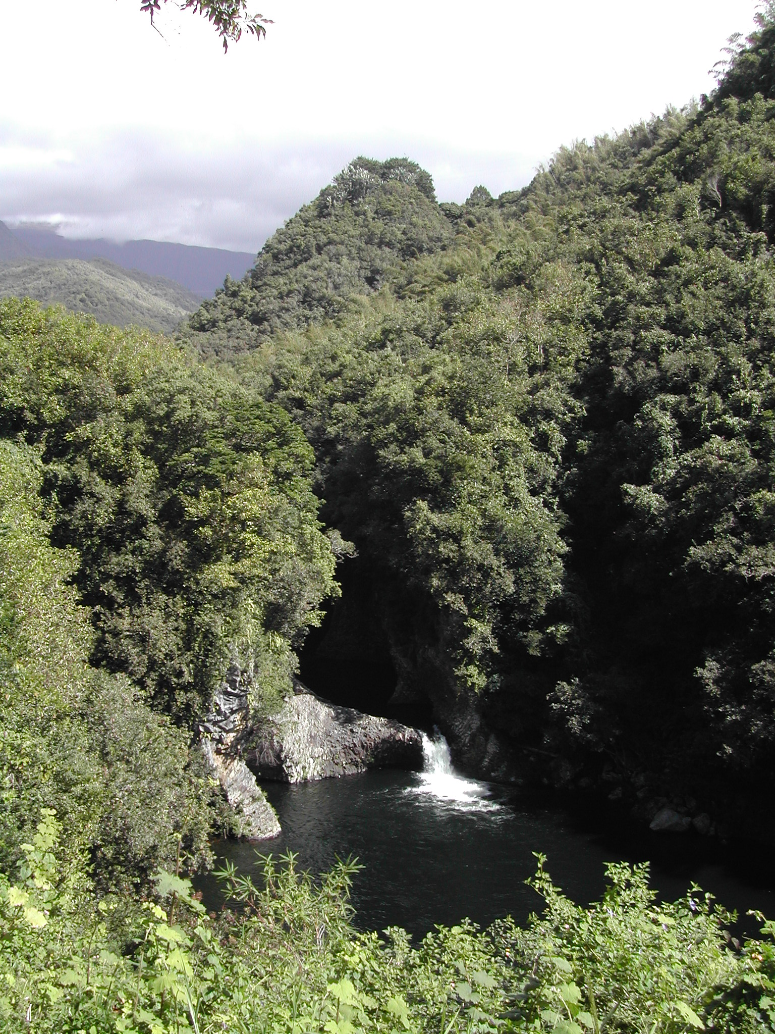 Photo d'un bassin de la Rivière des Roches.